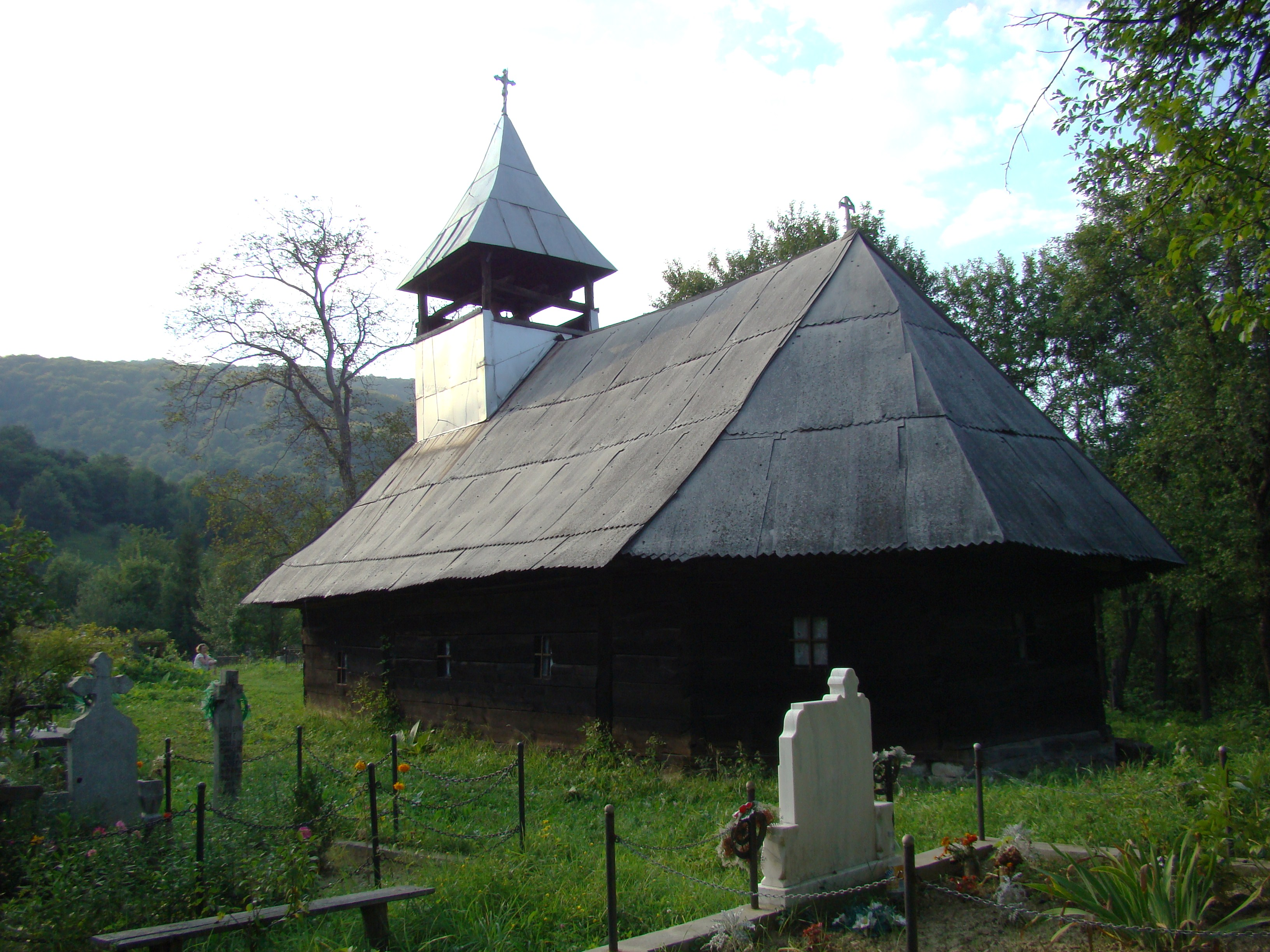 Biserica de lemn din Chergheș-Hunedoara